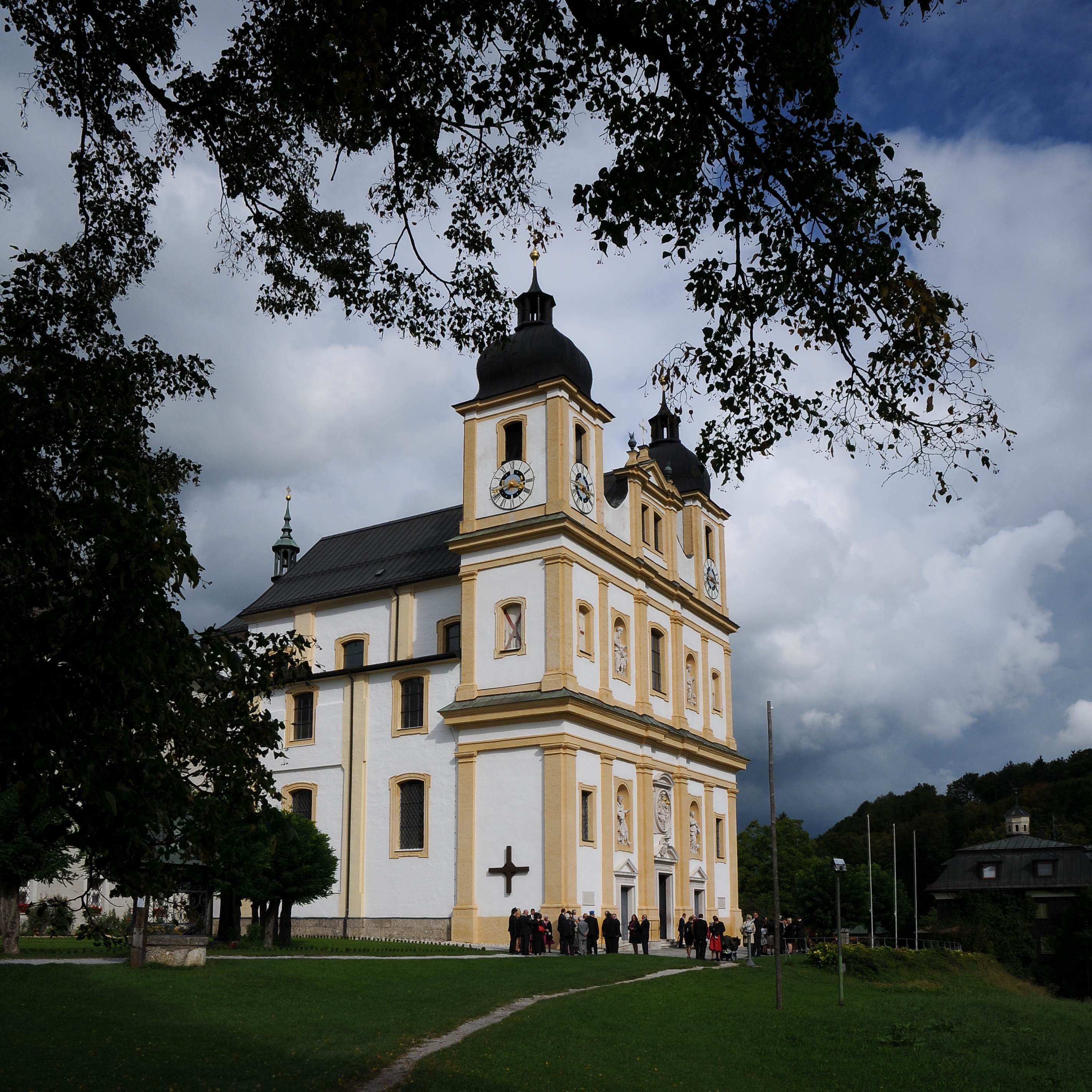 Maria Plain ist ein römisch-katholischer Wallfahrtsort in der Gemeinde Bergheim im Norden des österreichischen Bundeslandes Salzburg. Die Wallfahrtsbasilika Mariæ Himmelfahrt (15. August) auf dem Plainberg nördlich von Salzburg bildet mit den sie umgebenden Kapellen und Gebäuden ein geschlossenes barockes Ensemble. In der Wallfahrtskirche wird das Gnadenbild Maria Plain „Maria Trost“ verehrt.